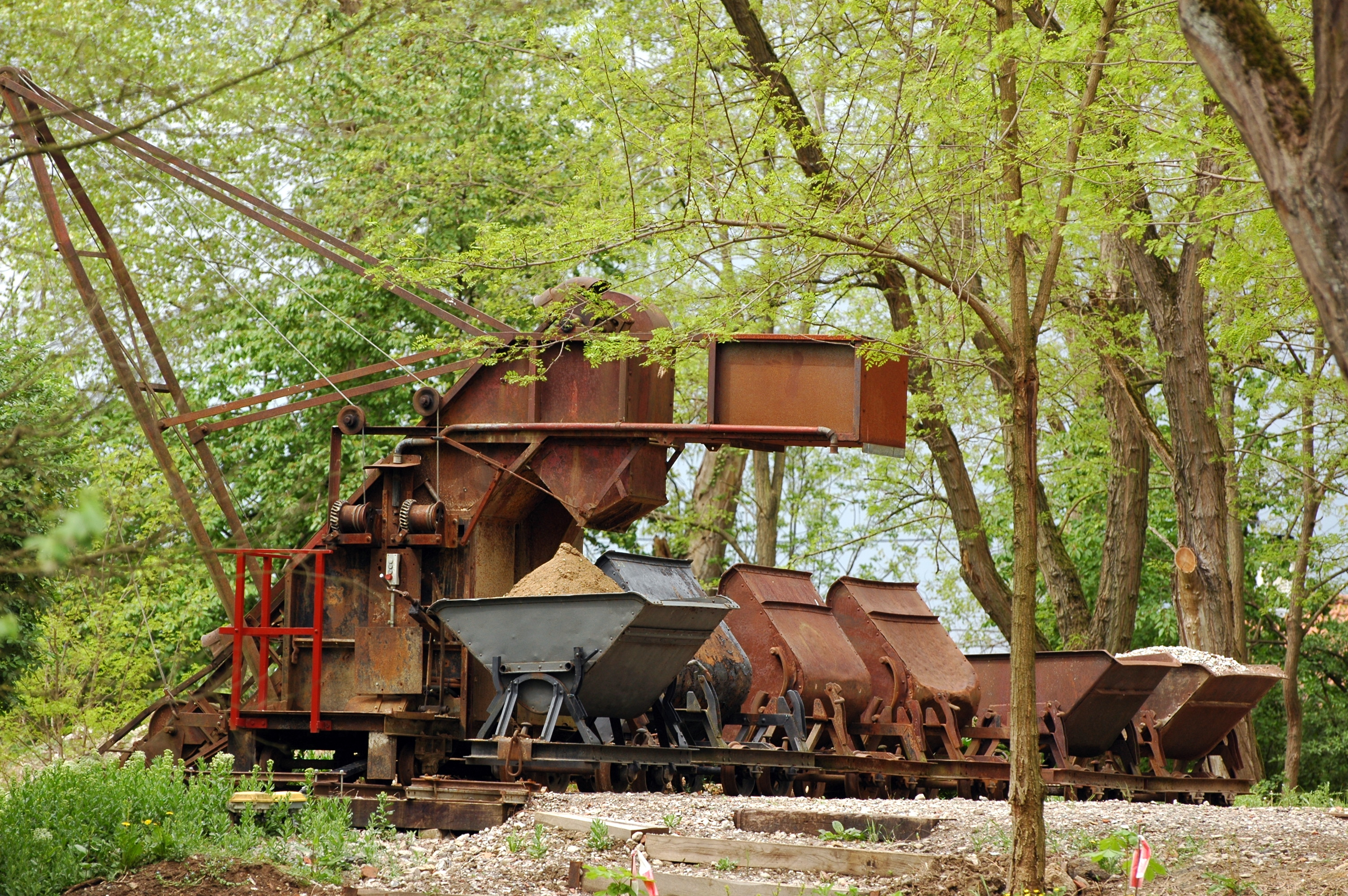 Feldbahn- & Industriemuseum Wiesloch